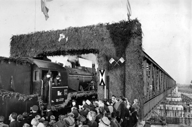 ADN-ZB/ Illus-dpd Noch eine Rheinbrücke eingeweiht Am Rhein wird eifrig geschafft. So wurden am 15. und 16.10.48 je eine Brücke dem Verkehr übergeben und zwar in Worms und in Köln. Unser Bild zeigt den ersten Eisenbahnzug beim Überqueren der festlich geschmückten "Nibelungenbrücke" bei Worms. 17-10-48 2313-48